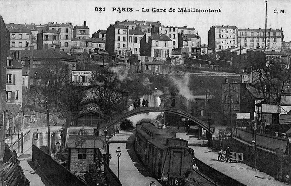 Photo de la gare de Ménilmontant avec la passerelle qui enjambe les voies de la Petite-Ceinture.